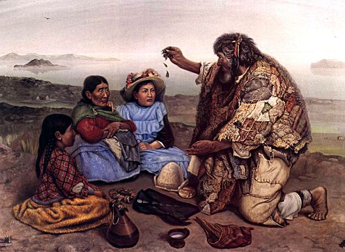 Arturo Borda: «El yatiri» (La Paz, 1918) - Óleo sobre lienzo. Colección particular, La Paz.